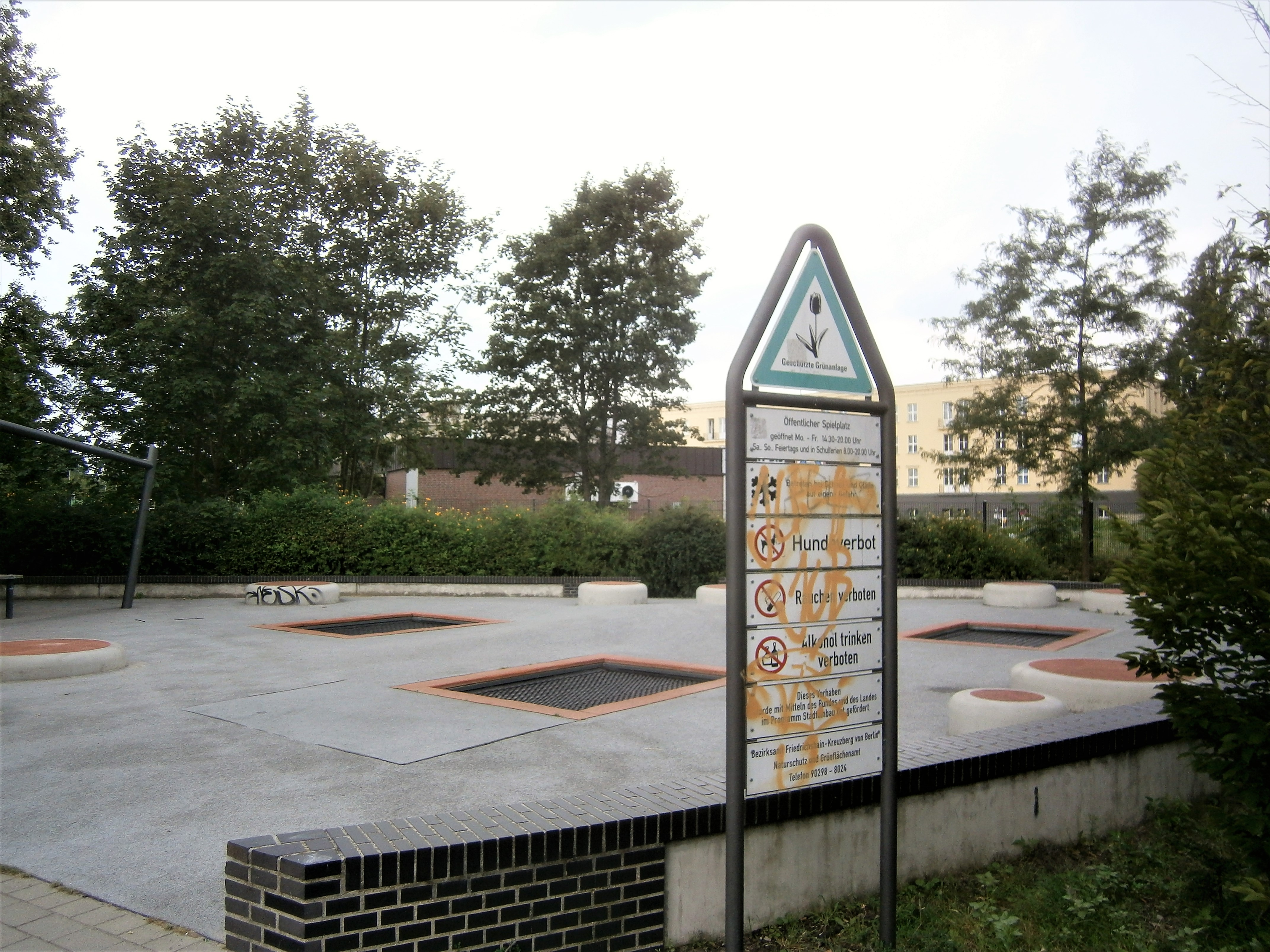 Die Marchlewskistraße ist eine Straße im Berliner Bezirk Friedrichshain-Kreuzberg, Ortsteil Friedrichshain. Angelegt und benannt wurde sie um 1870 auf dem Communicationsweg außerhalb der abgerissenen Berliner Zollmauer unter dem Namen Memeler Straße. Im Jahre 1950 erfolgte die Umbenennung in Marchlewskistraße. Schwere Schäden an der Bebauung bei Luftangriffen im Zweiten Weltkrieg brachten beim Neuaufbau Änderungen, jedoch der Straßenlauf blieb erhalten. Das Bild zeigt im Einzelnen: der öffentliche Spielplatz auf Nummer 74, hier befanden sich vor der Kriegszersörung die Comenius-Lichtspiele.